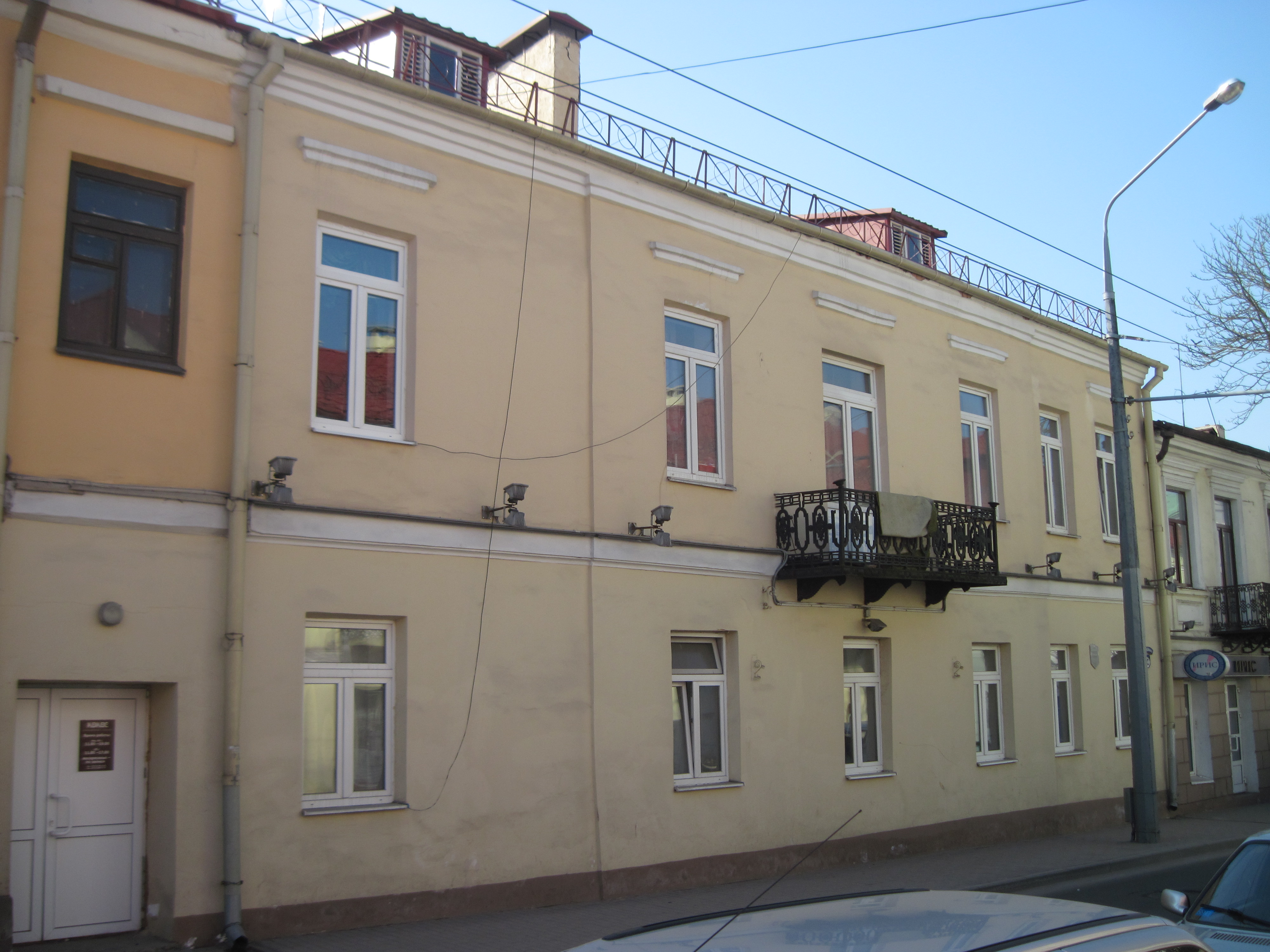 Забудова гістарычнага центра Гродна. Вуліца К. Маркса, 13